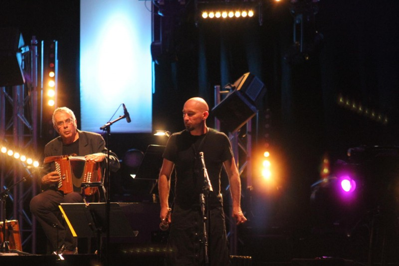 concert de Denez Prigent au festival interceltique de Lorient 2011.